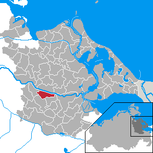 Stolpe, Landkreis Ostvorpommern, Mecklenburg-Vorpommern